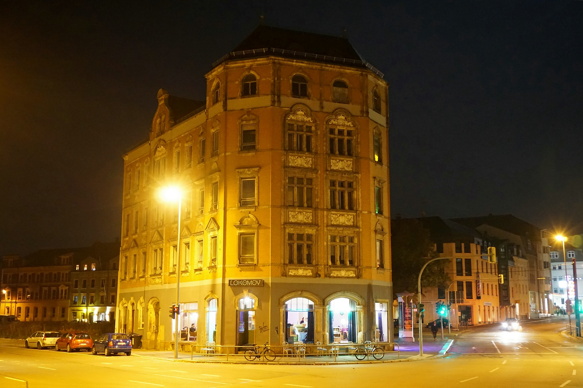 Das alternative Kulturzentrum "LOKOMOV" in der Augustusburger Straße mit Club, Galerie, Pizzaria und Vereinsräumen